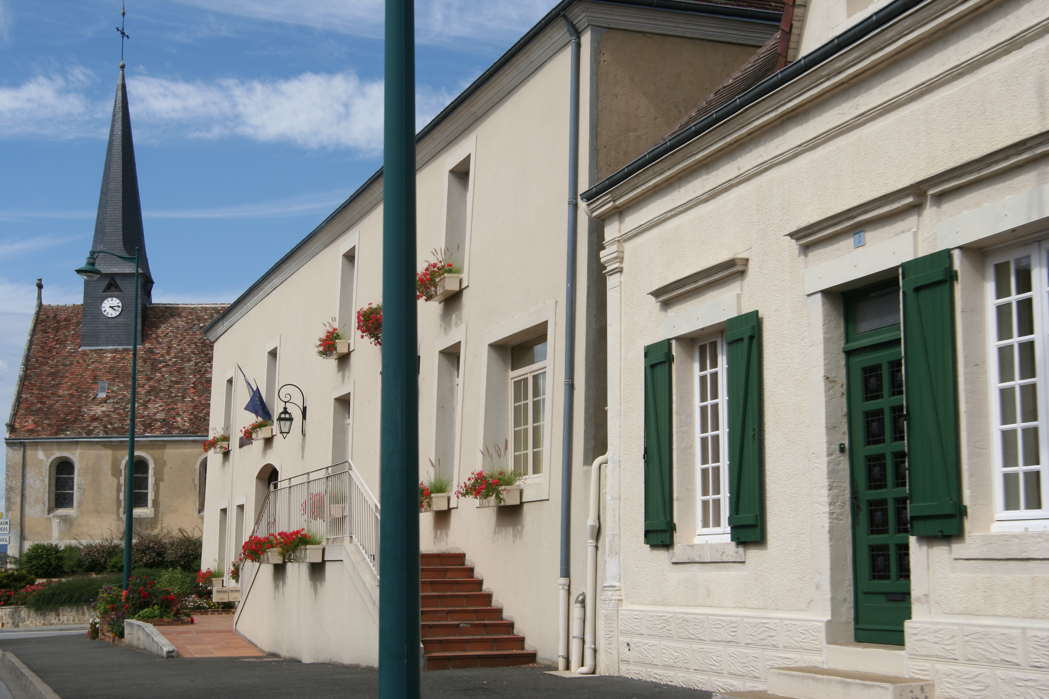 La mairie de Saint-Rémy-des-Monts.